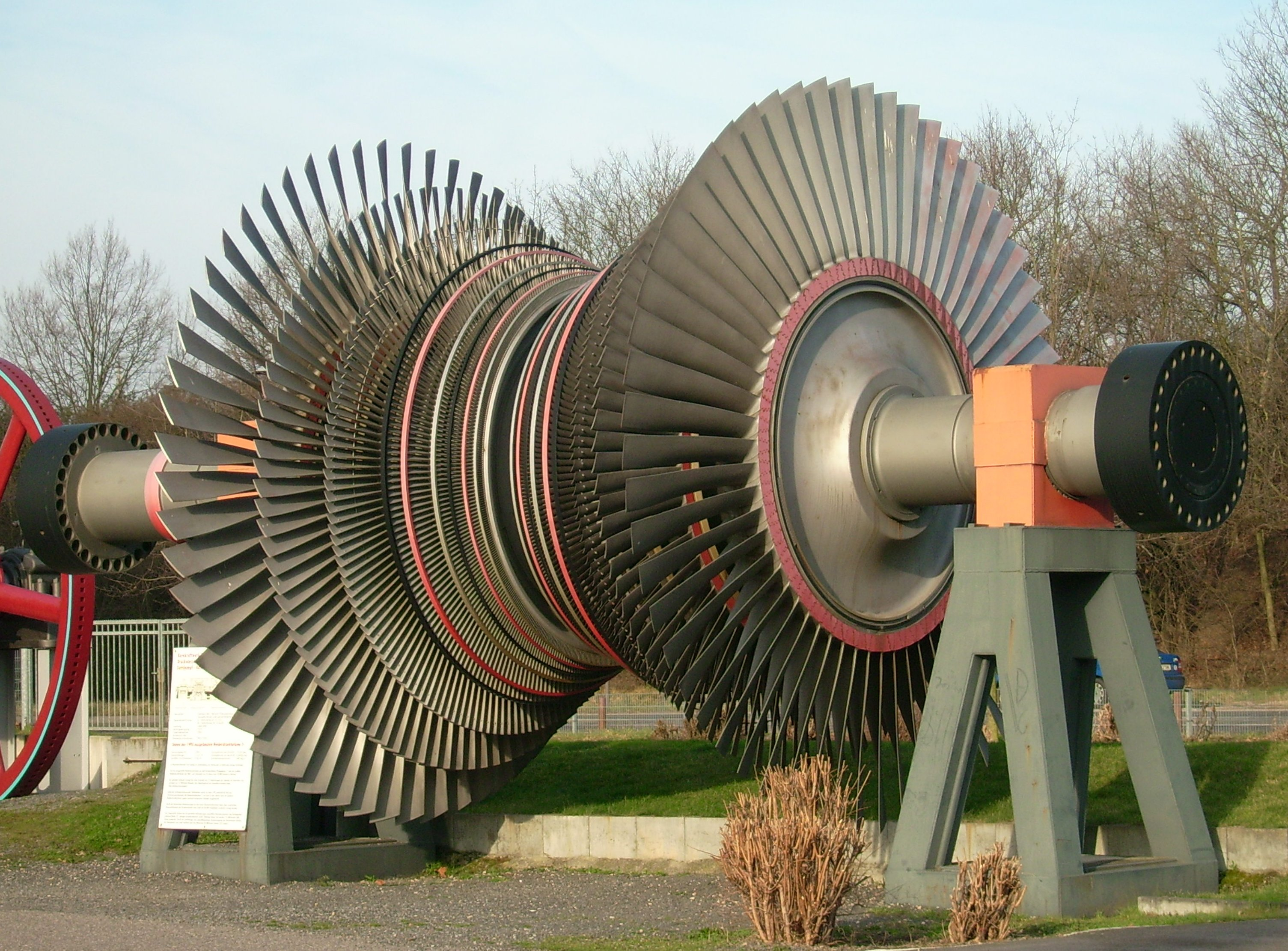 Turbine im Technikmuseum in Speyer